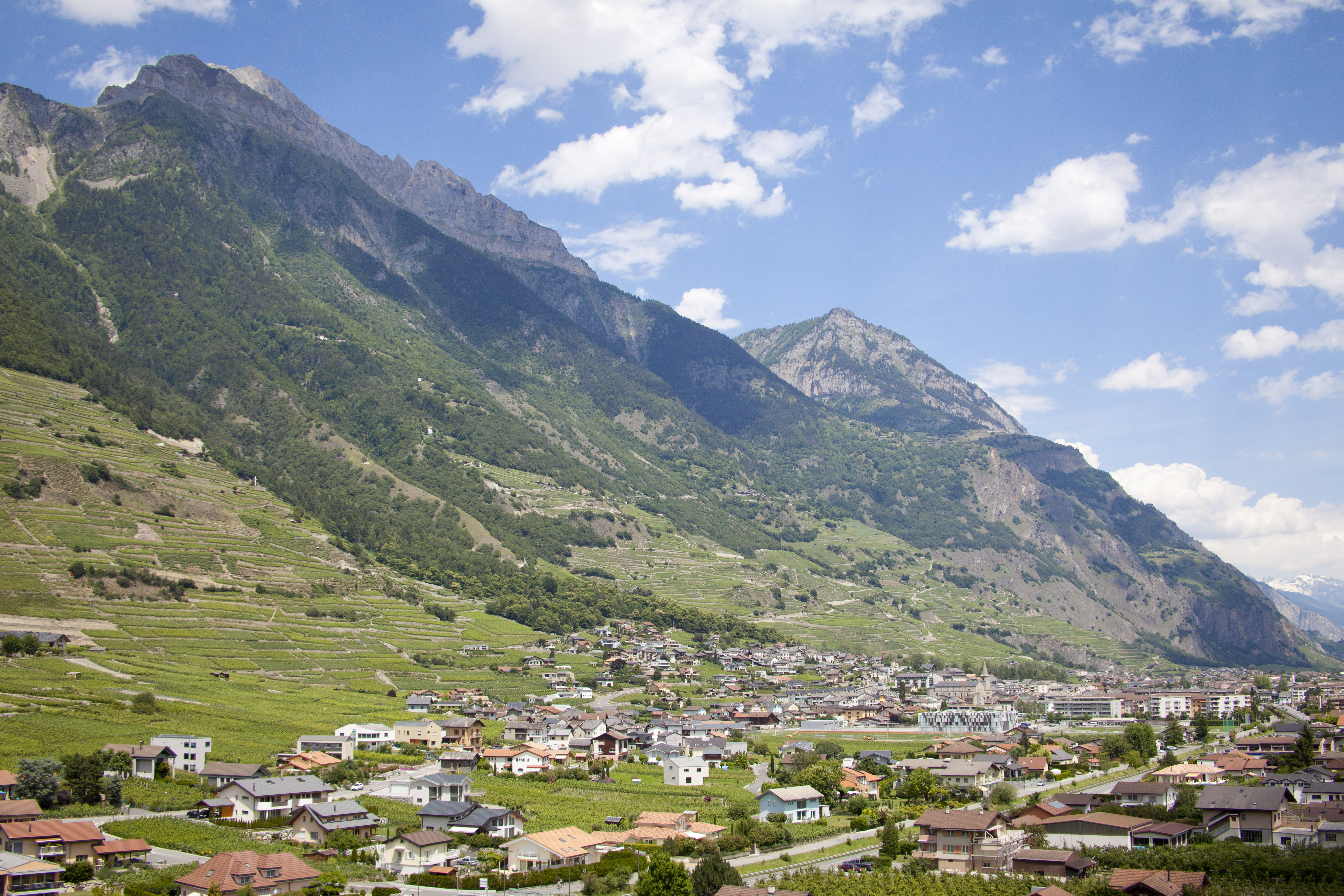 Ville de fully en suisse